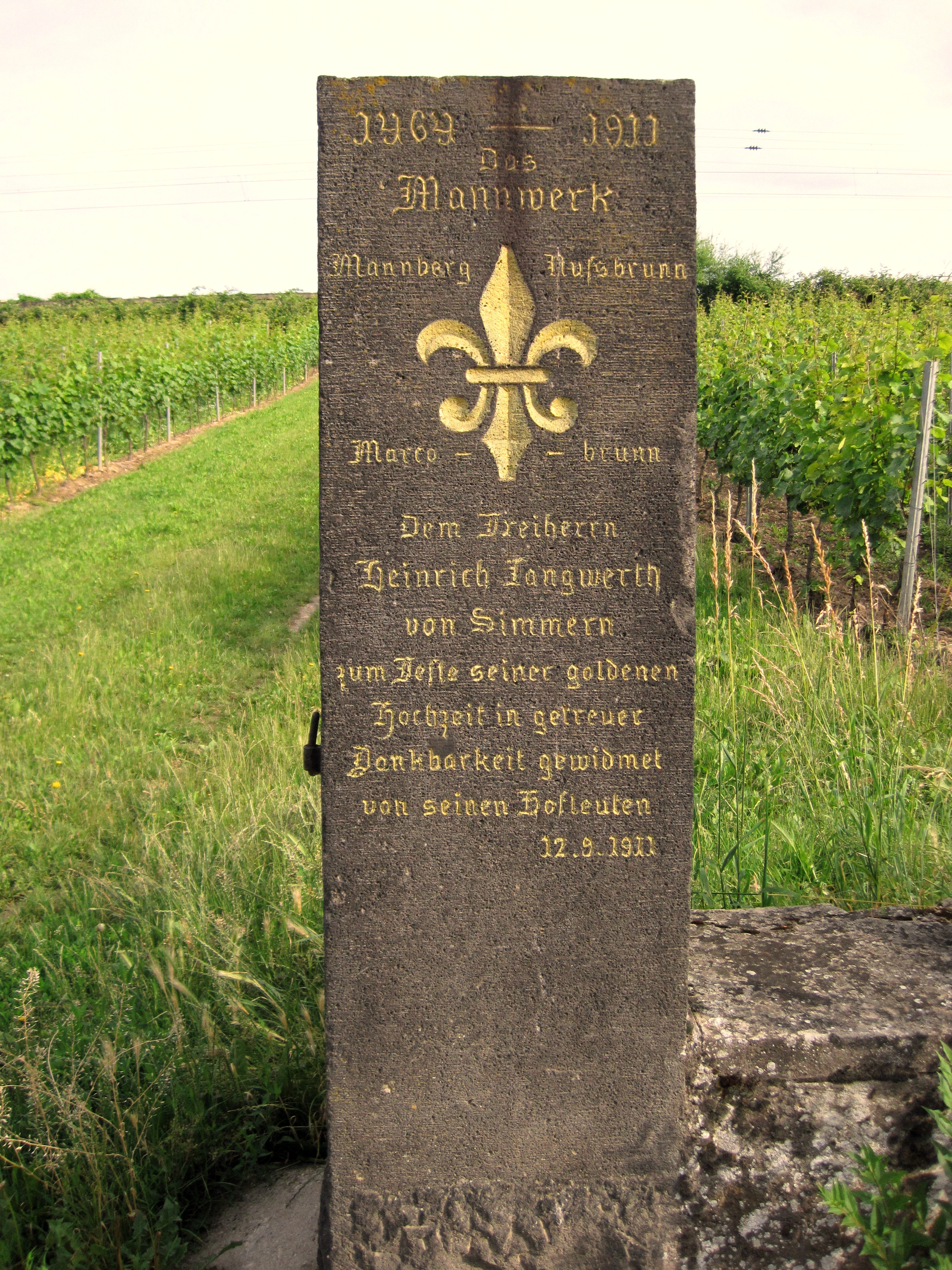 Weinlage Hattenheimer Mannberg in Hattenheim, Rheingau. Gedenkstein für Heinrich Langwerth von Simmern anläßlich seiner goldenden Hochzeit im Jahr 1911. Die Inschrift lautet: "1464-1911. Das Mannwerk. Mannberg Nußbrunn Marcobrunn. Dem Freiherrn Heinrich Langwerth von Simmern zum Feste seiner goldenden Hochzeit in getreuer Dankbarkeit gewidmet von seinen Hofleuten. 12.9.1911". Die Lilie steht für das Wappen der Familie Langwerth von Simmern.